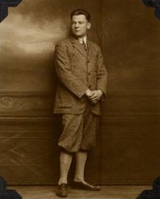 Karel Brady Metzl (1898-1942), český obchodník